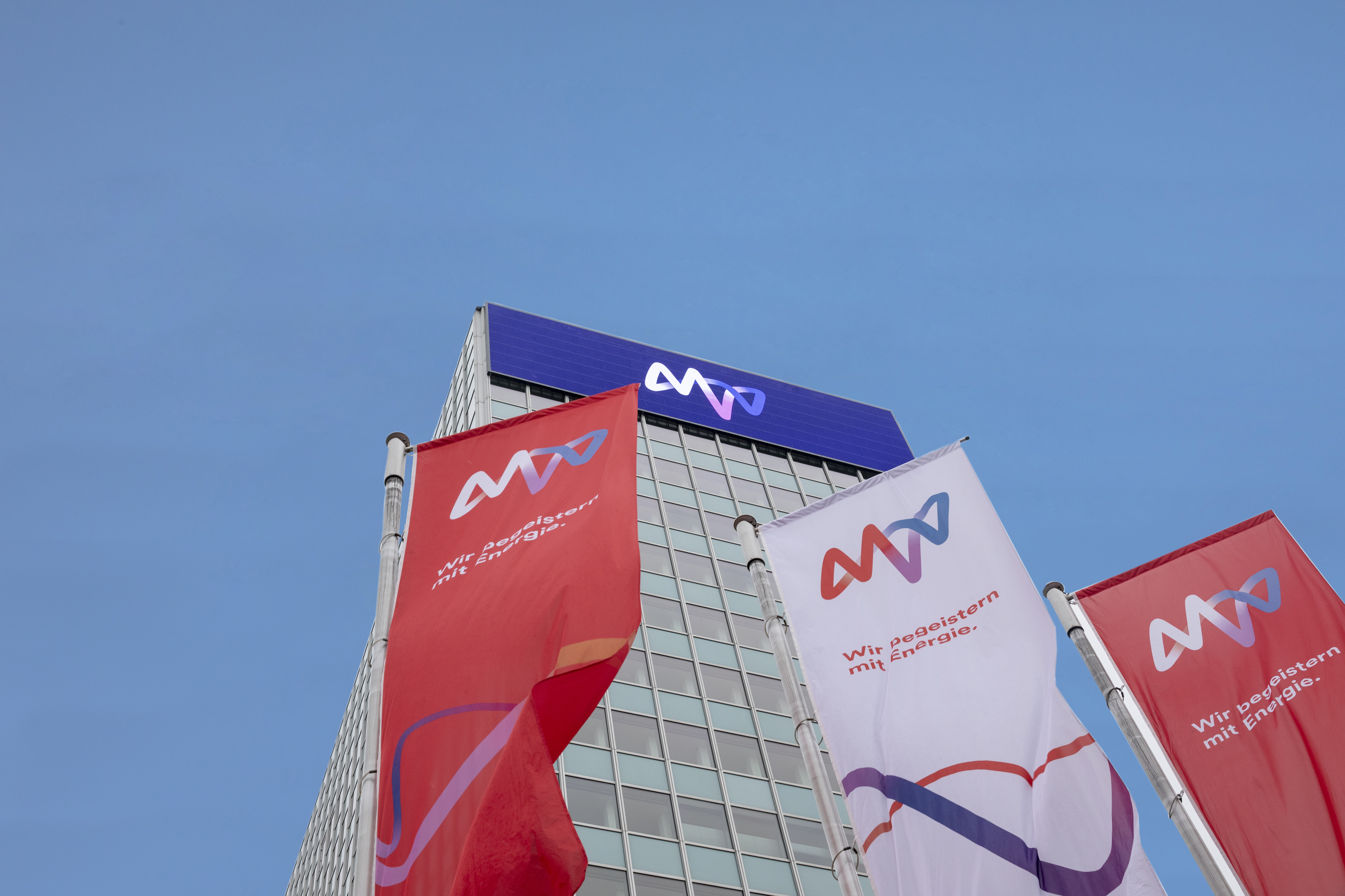 Konzernzentrale der MVV in Mannheim